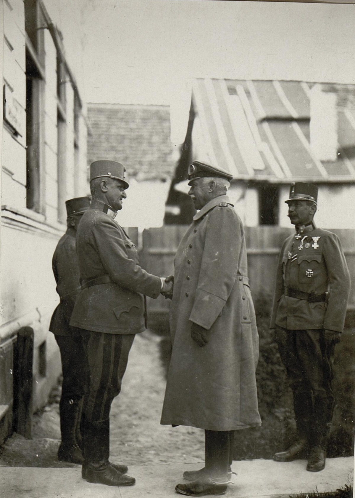 Besuch des deutschen Generals Johannes von Eben in Pomorzany. General Ernst Kletter Edler von Gromnik und Generalmajor Eduard Bölz begrüßen den deutschen Bündnispartner